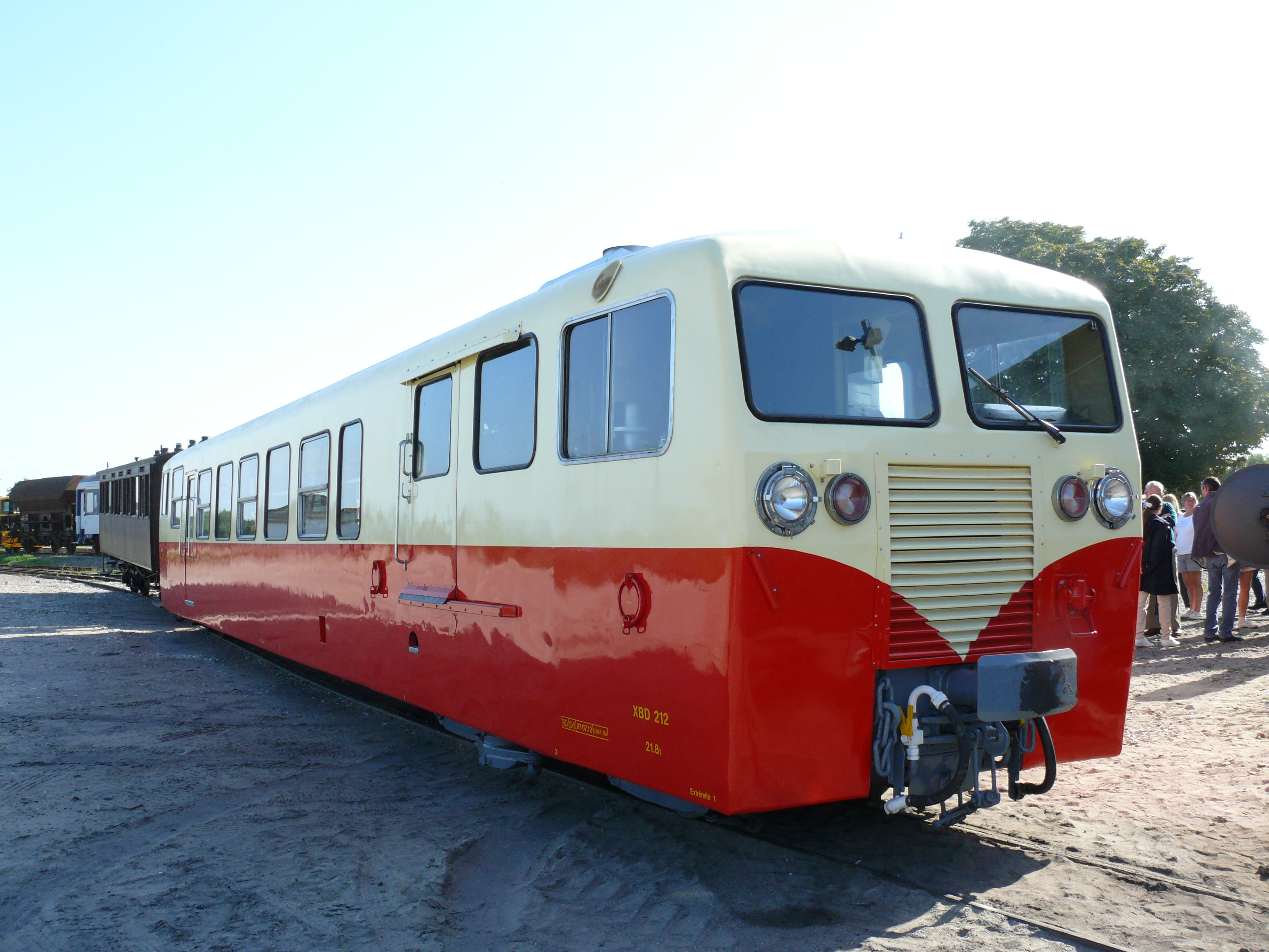 Autorail XBD 212 construit par SCF.Verney ex PO-Corrèze puis Blanc-Argent